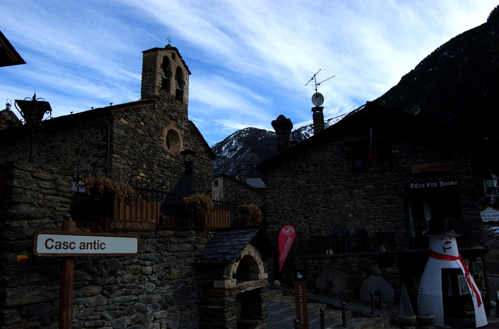 El alojamiento, en el pueblo andorrano de Llorts.